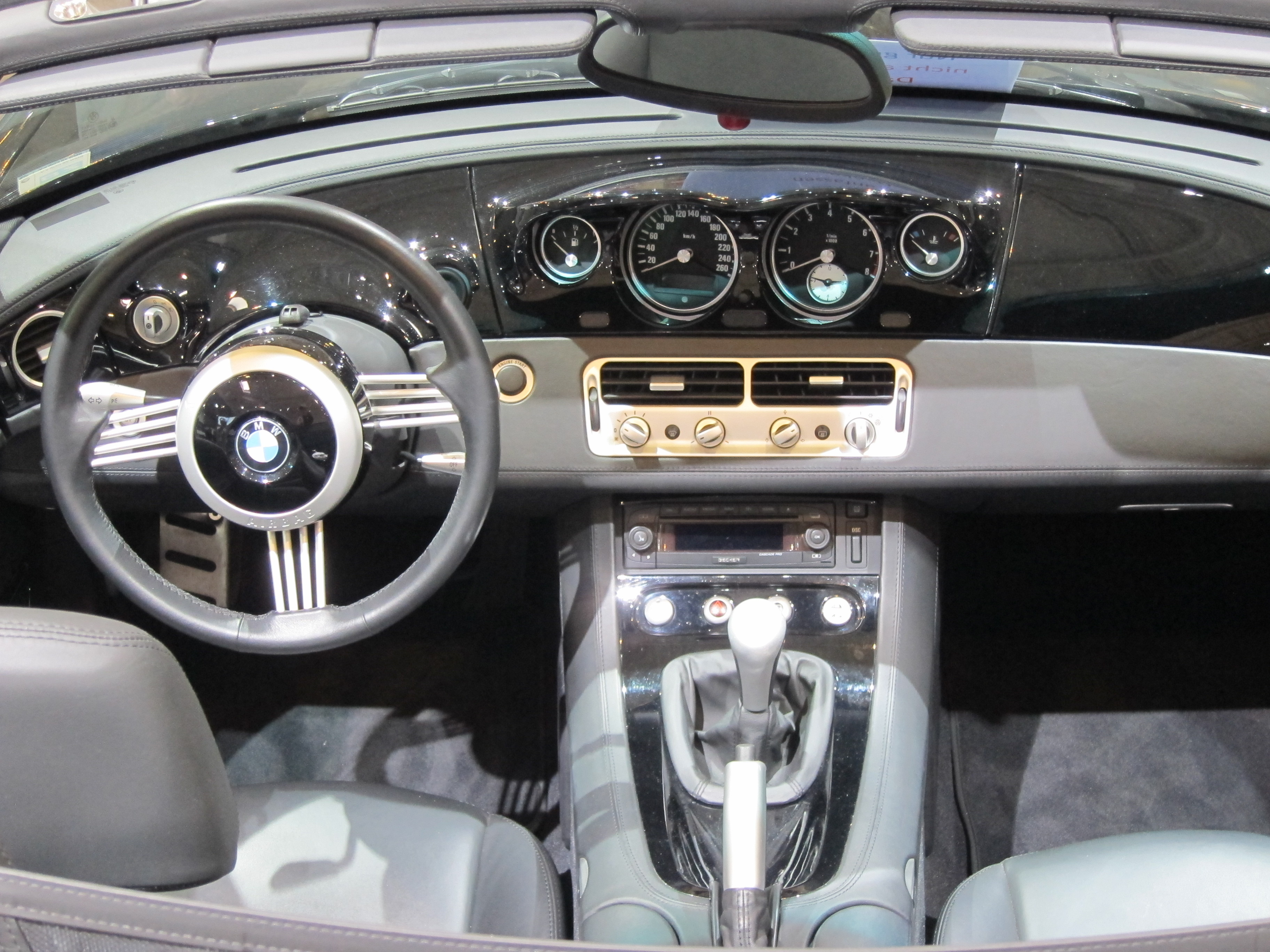 Techno Classica 2012